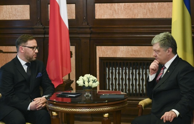 Президент України Петро Порошенко прийняв вірчі грамоти у послів низки іноземних держав: Польщі - Бартош Цихоцький